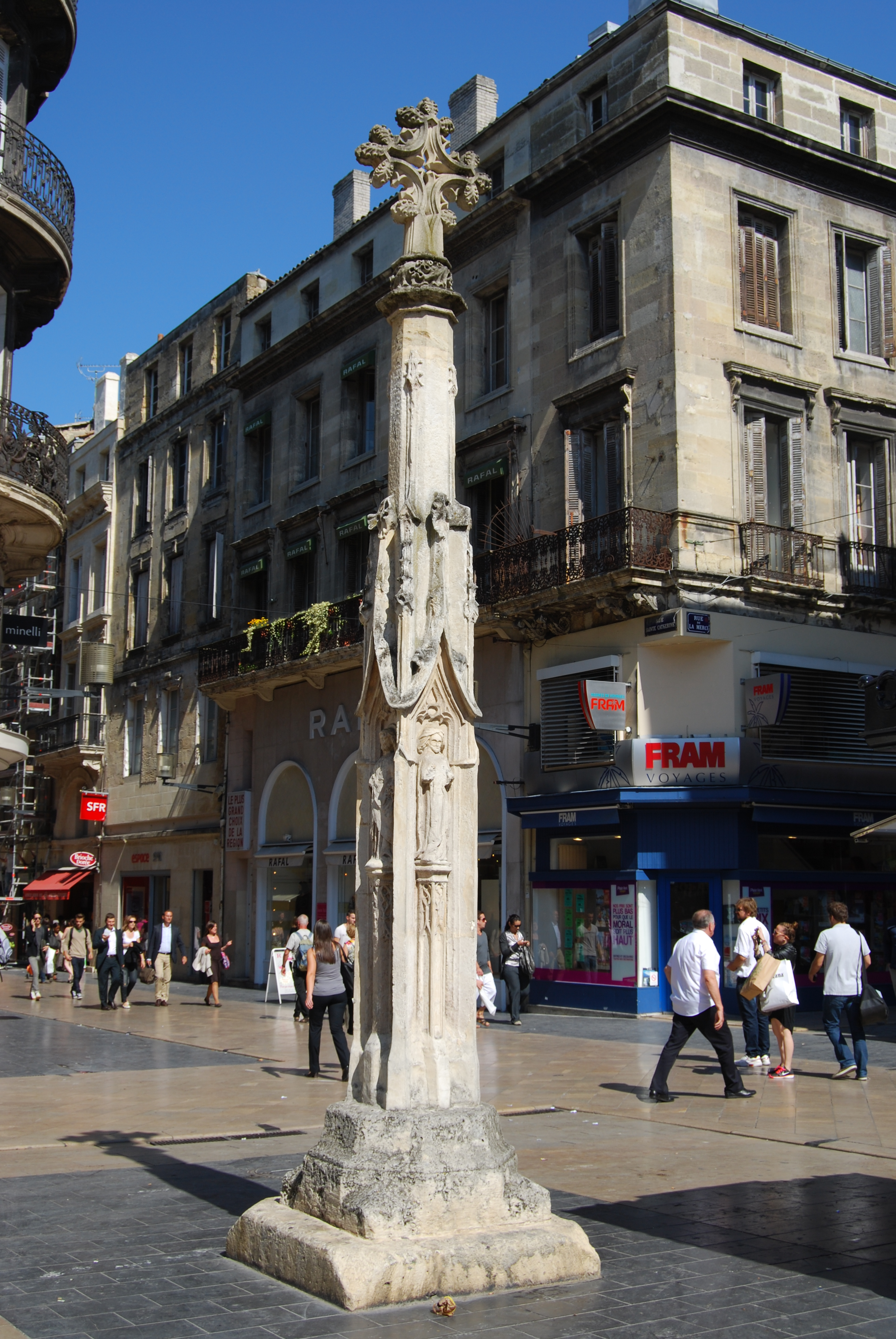 Croix du cimetière Saint-Projet, Place Saint-Projet (Inscrit, 1926) .